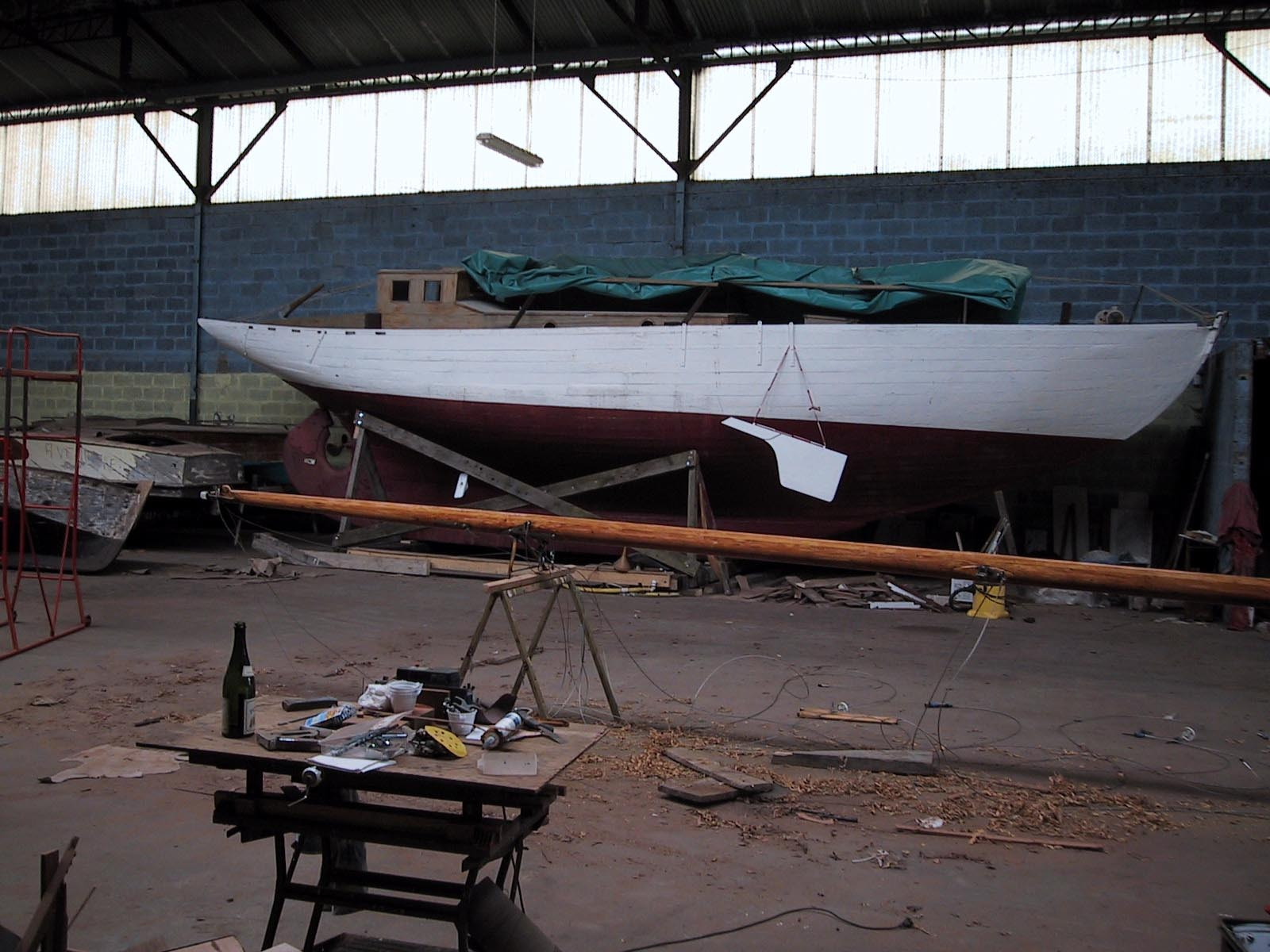 Etat actuel de l'Anahita